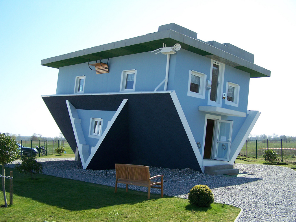 Die Welt steht Kopf in Trassenheide, Usedom, 2009